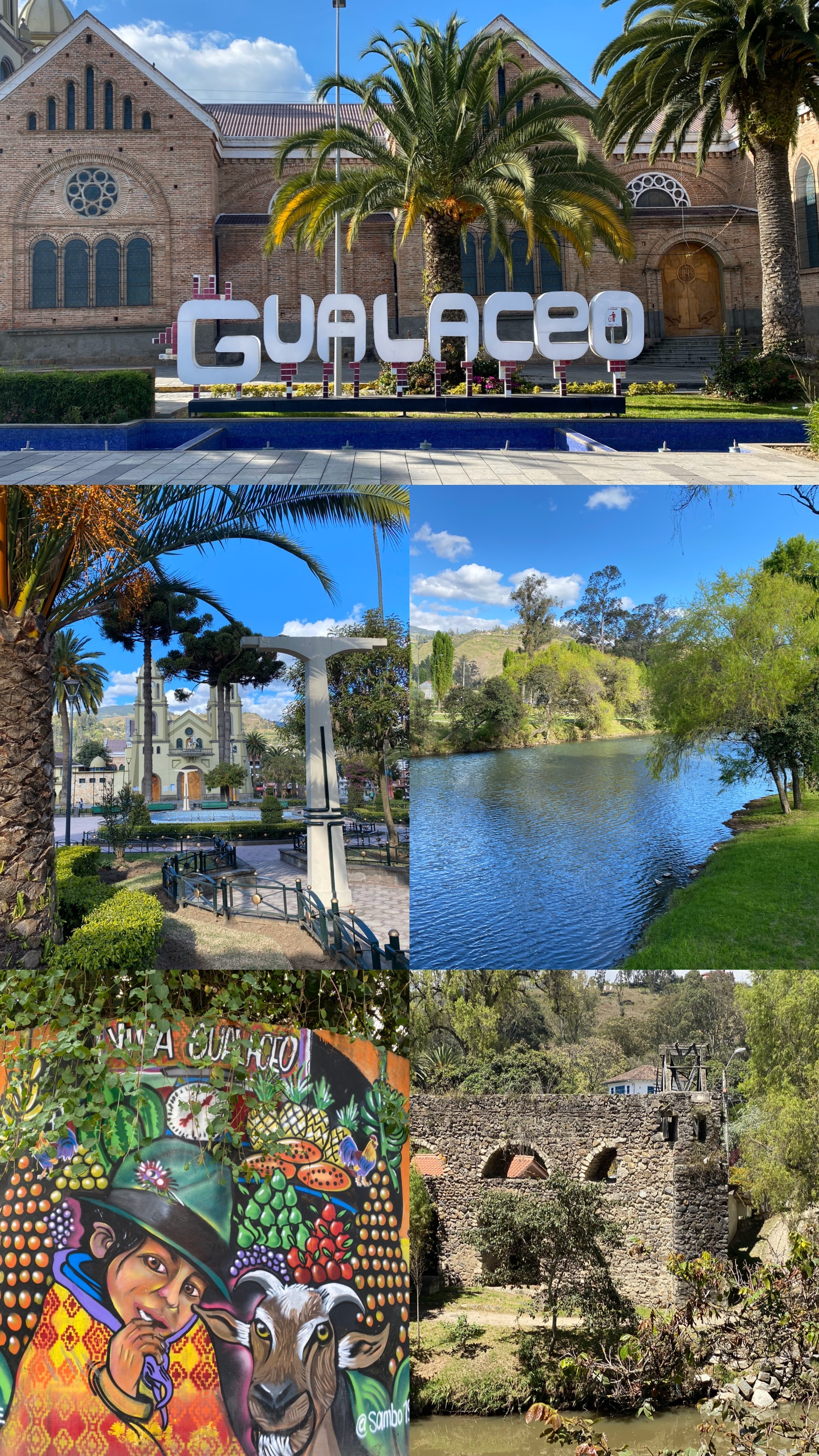 Desde arriba en sentido horario: Vista de la Plaza Cívica de Gualaceo, orilla del Río Santa Barbara, acueducto de Gualaceo, expresión artística ubicado en la esquina de las calles Cuenca y Vicente peña Reyes, parque 10 de Agosto.